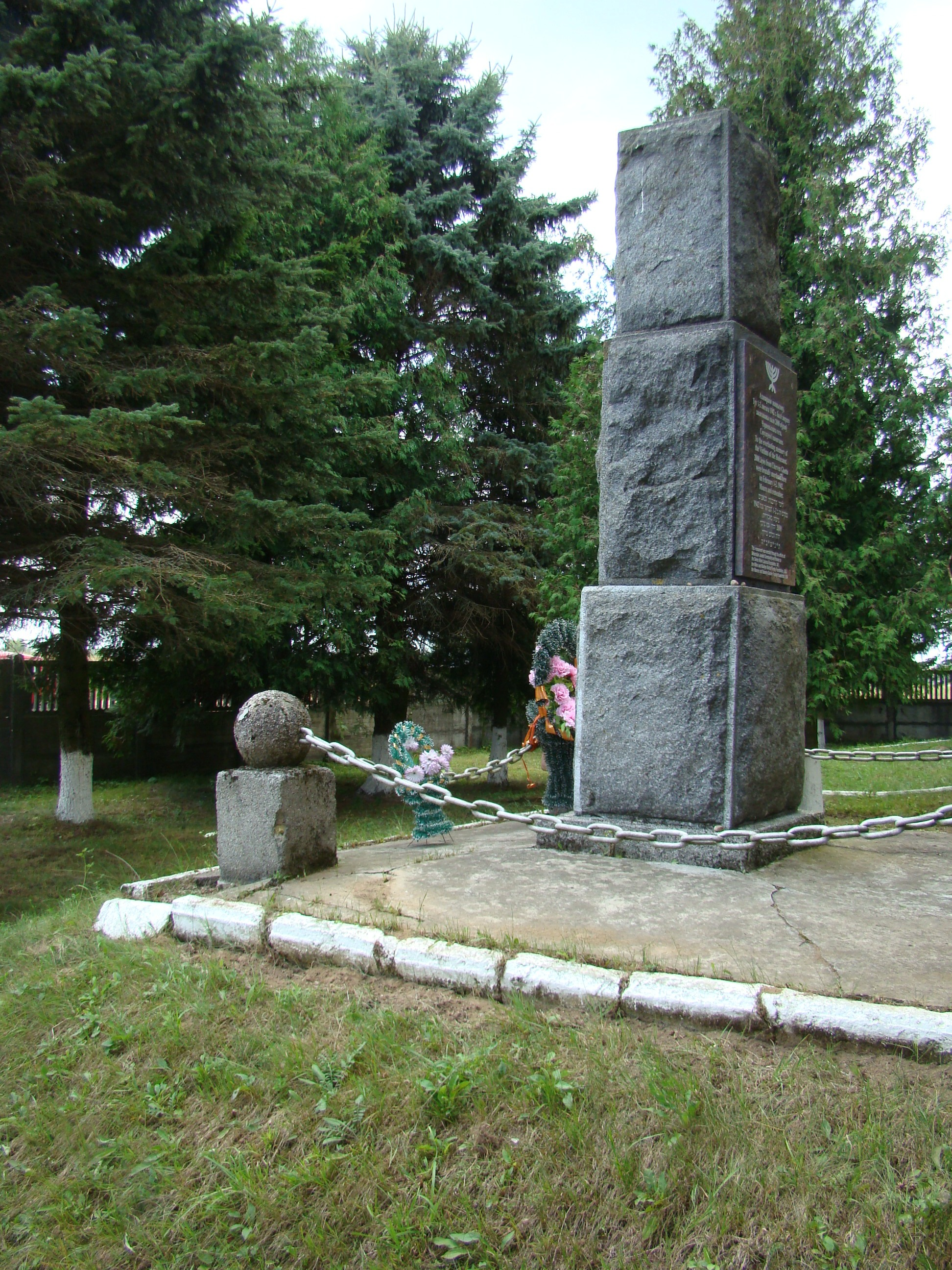 Памятник на месте массового убийства 2000 евреев Червеньского гетто 1-2 февраля 1942 года. Открыт 25 августа 1968 года, а в 2012 году на месте надписи прикреплена новая доска с текстом. Находится на окраине Червеня в конце улицы Заметовского (урочище Глинищи).